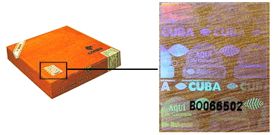 Sigle holographique d'une boite de Habanos (cigares cubains)